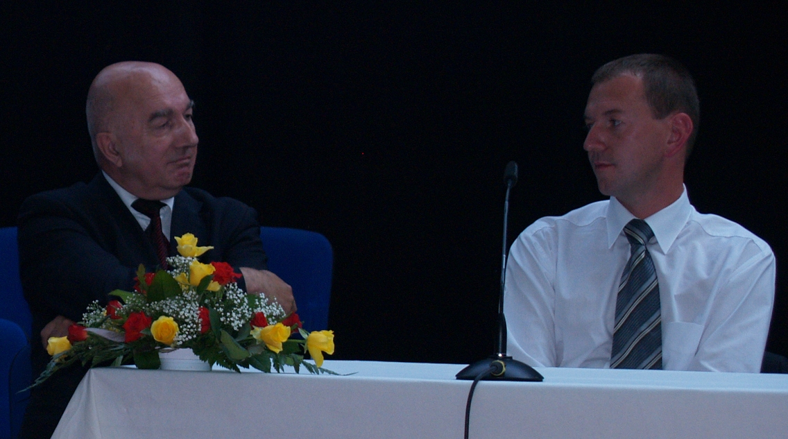 Norbert Rasch (r.) mit Henryk Kroll am 30. Tag der Oberschlesier in Rheinberg